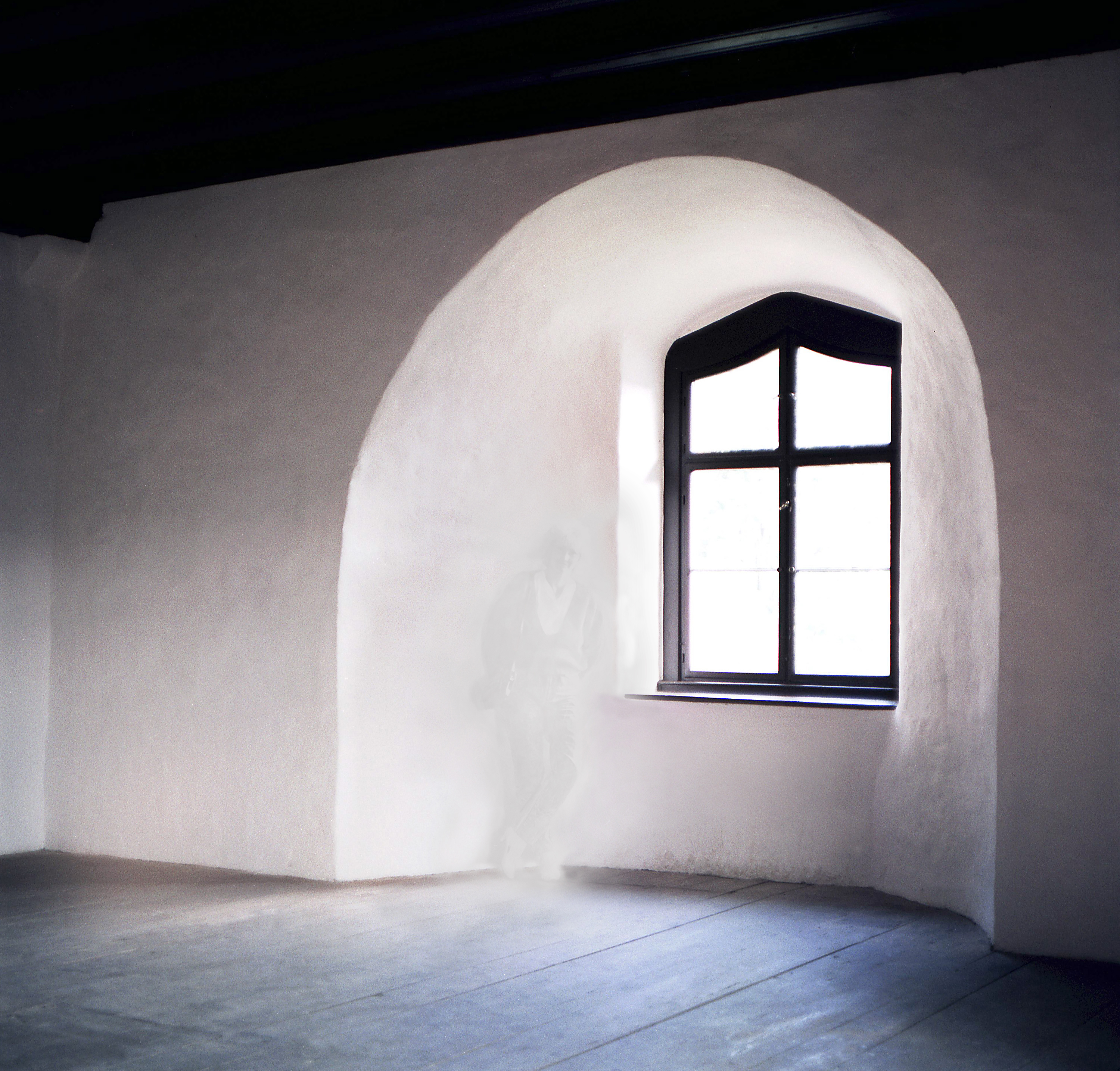 01.10.1988 DDR 8301 [01825] Liebstadt: Schloß Kuckuckstein (GMP: 50.863488,13.858282). Mit viel Glück kann man in dem verwinkelten Haus noch geisterhafte Erscheinungen sehen. Saal auf der Südseite. [R19881001A02.jpg.JPG]19881001041NR.JPG(c)Blobelt